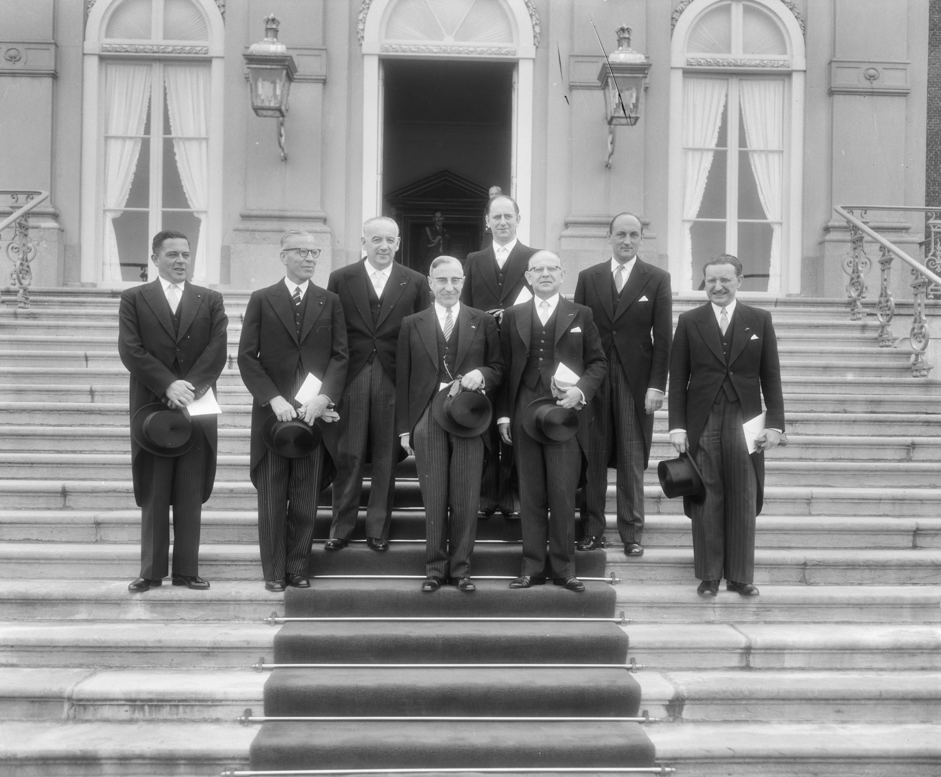 Collectie / Archief : Fotocollectie Anefo Reportage / Serie : Beëdiging van het kabinet De Quay op paleis Huis ten Bosch Beschrijving : V.l.n.r. mr. V.G.M. Marijnen, mr. A.C.W. Beerman, S.J. van den Berg, prof. dr. J.E. de Quay, drs. J.W. de Pous, drs. H.A. Korthals, mr. E.H. Toxopeus en dr. Ch. J.M.A. van Rooy Datum : 19 mei 1959 Locatie : Den Haag, Zuid-Holland Trefwoorden : bordessen, groepsportretten, ministers, paleizen Persoonsnaam : Beerman, A.C.W., Bergh, S.J. van den, Korthals, H.A., Marijnen, V.G.M., Pous, Jan W. de, Quay, J.E. de, Rooy, Ch.J.M.A. van, Toxopeus, E.H. Fotograaf : Pot, Harry / Anefo, [onbekend] Auteursrechthebbende : Nationaal Archief Materiaalsoort : Negatief (zwart/wit) Nummer archiefinventaris : bekijk toegang 2.24.01.04 Bestanddeelnummer : 910-3814